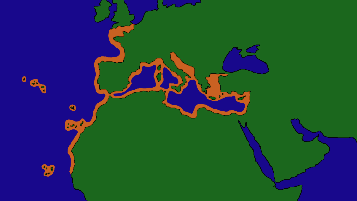 Verbreitungskarte von Mureana helena, verändert nach IUCN, 2017